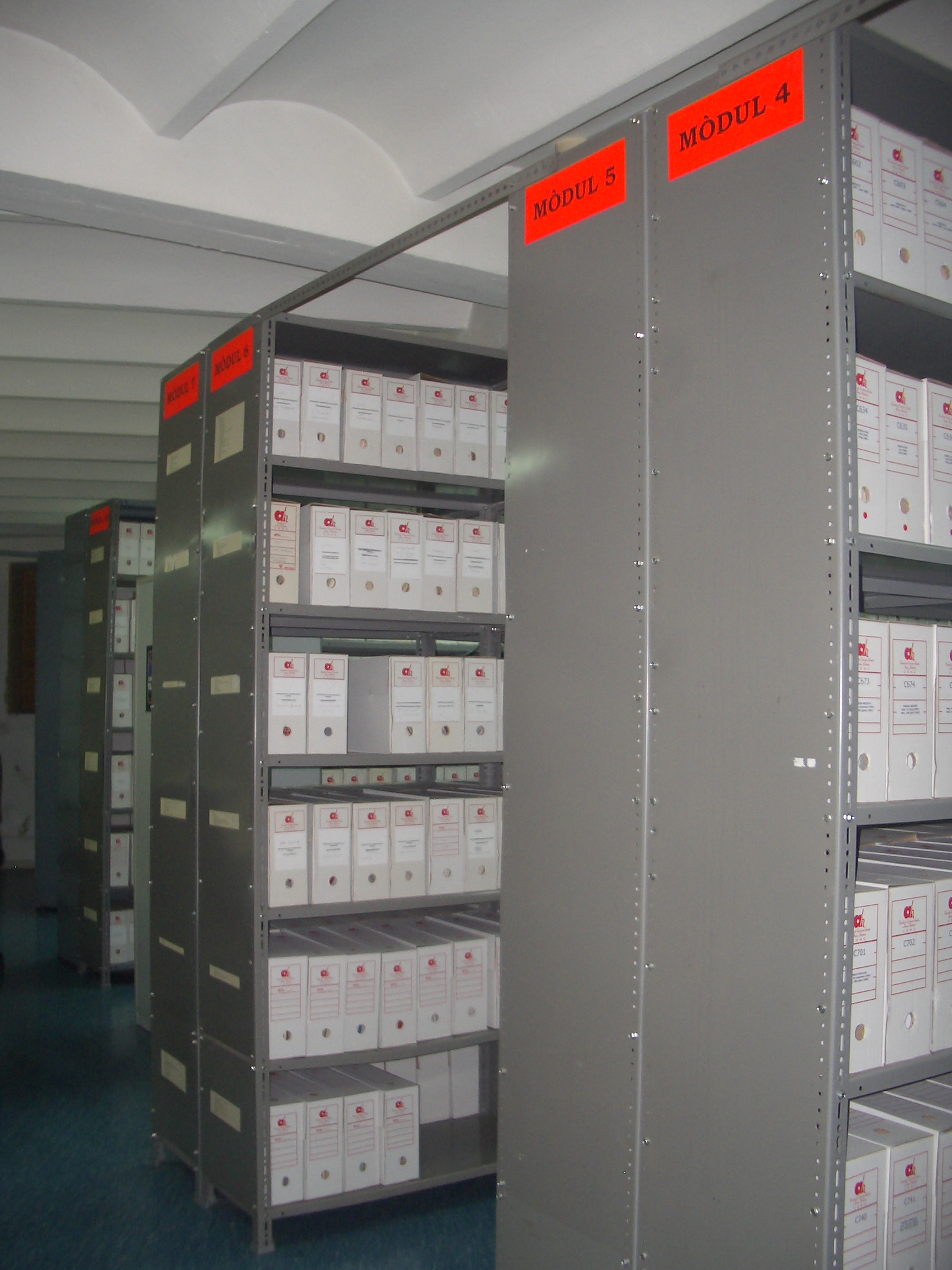 Fotografia parcial del fons de l'AHCOArxiu Històric de Comissions Obreres de Catalunya